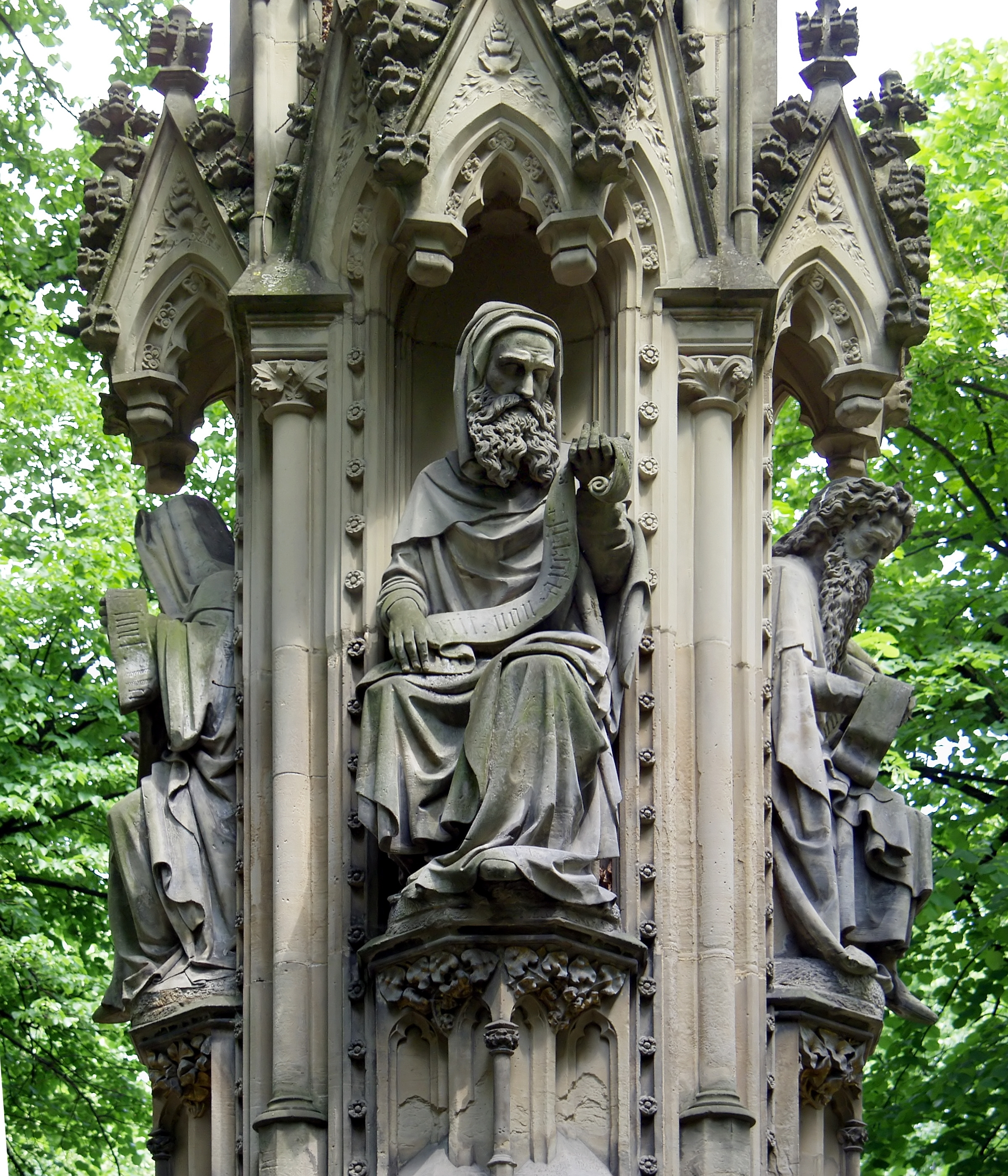 Detail von der Mariensäule (Köln): Prophet Ezechiel. Entwurf: Edward von Steinle, Ausführung: Peter Fuchs.